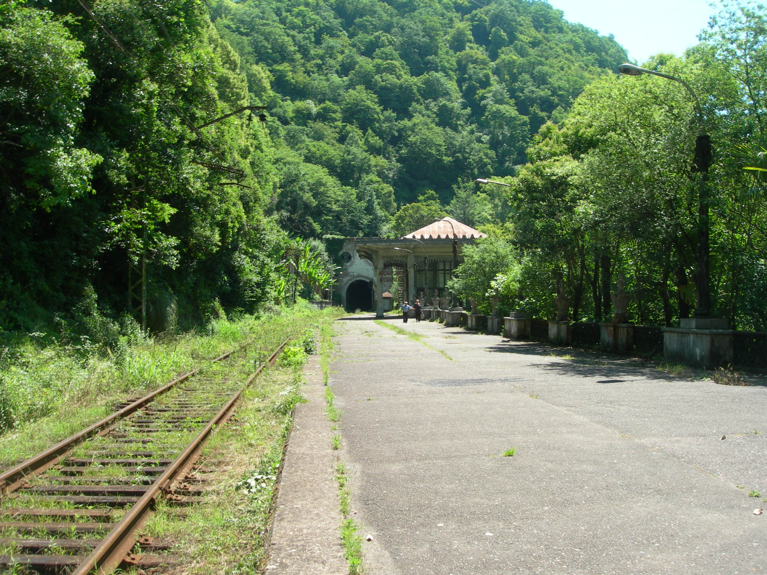 Psyrtskha_platform2 Платформа станции Псырцхка (Абхазия, Новый Афон)